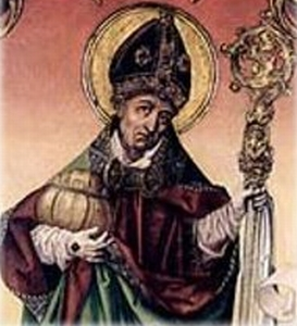 Ölbild aus dem Mittelalter. Darstellung des Heilgen Rupert von Salzburg mit dem Salzfass in der Hand